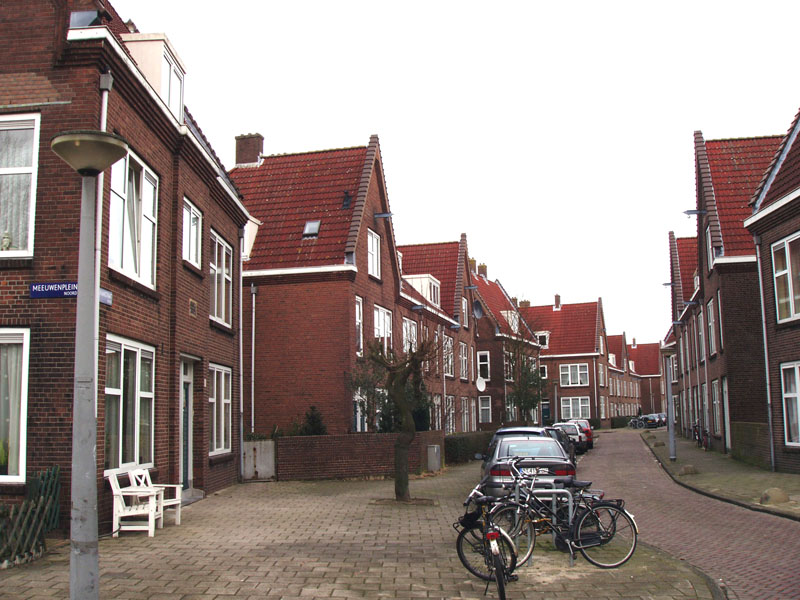 Pelikaanstraat in de Vogelbuurt van Amsterdam-Noord, bouwjaar 1923-1924